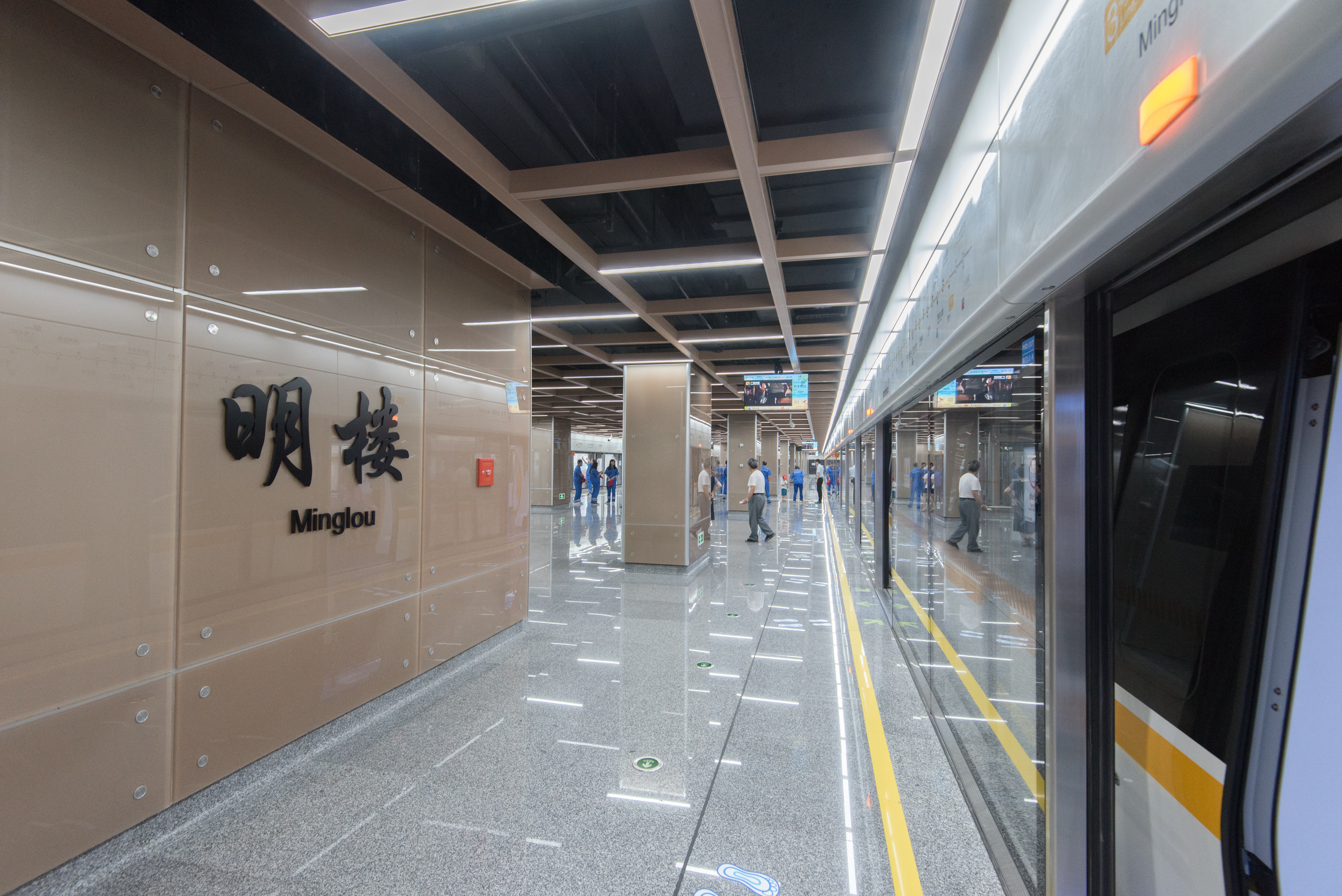 明楼站大字壁